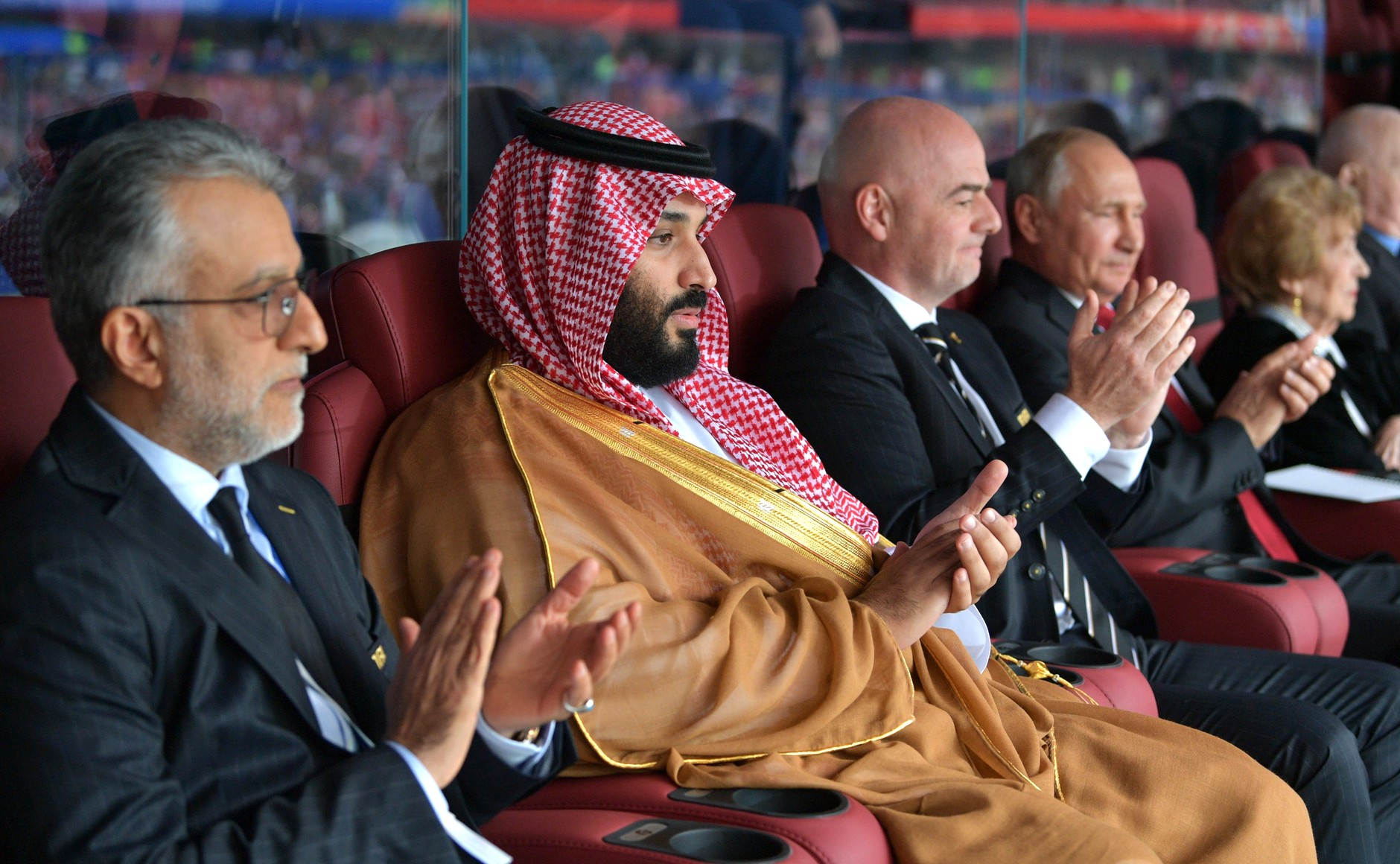 Церемония открытия чемпионата мира по футболу 2018 года. Владимир Путин, президент ФИФА Джанни Инфантино и Наследный принц Саудовской Аравии Мухаммед Бен Сальман Аль Сауд (справа налево)